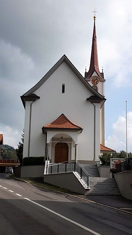 Allenwinden, Kanton Zug, Schweiz - Kirche St. Wendelin